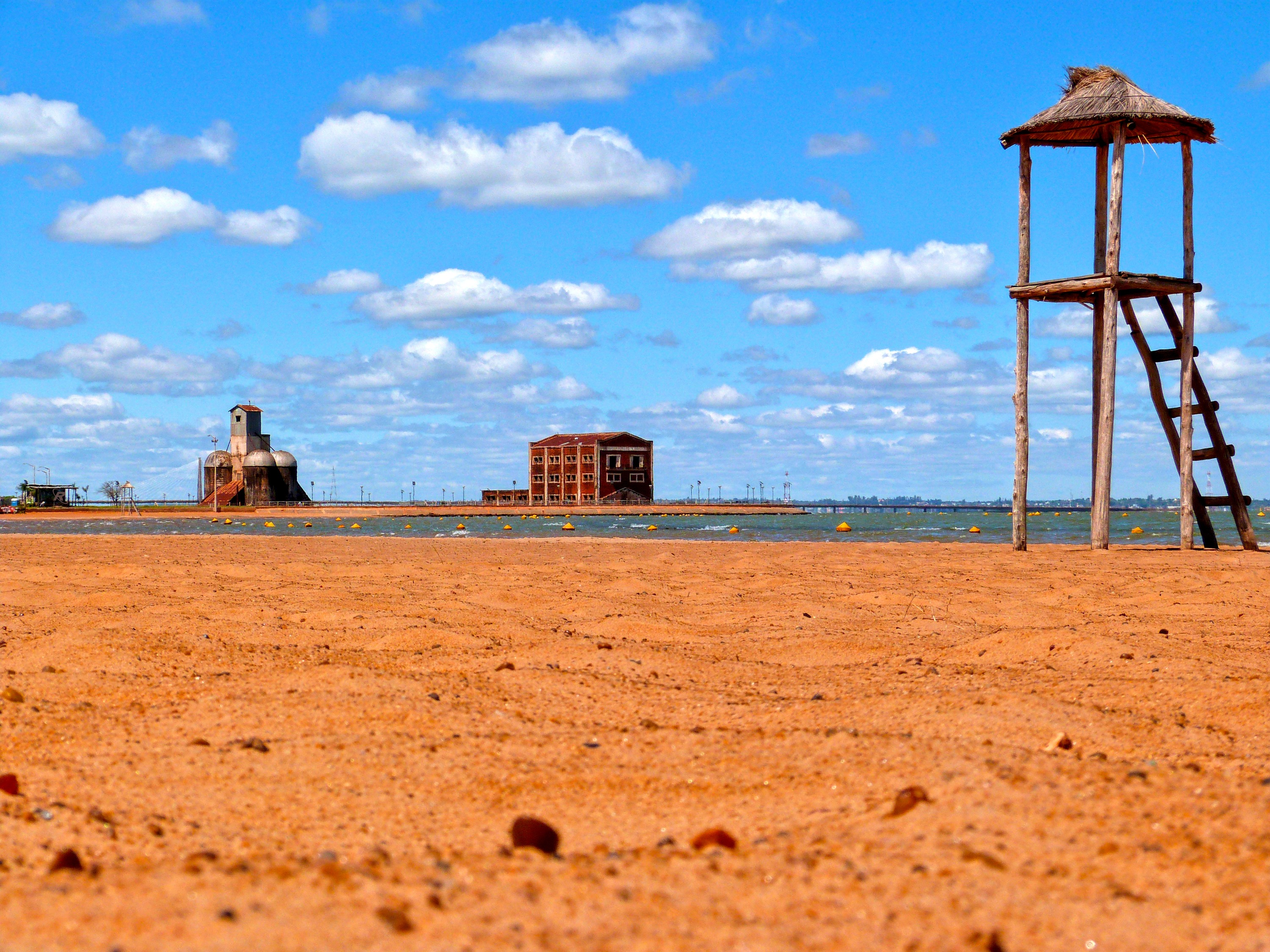 Vista parcial de la Playa San José, al fondo se ven unos de los símbolos patrimoniales, el viejo Silo y el ex Molinos San José.